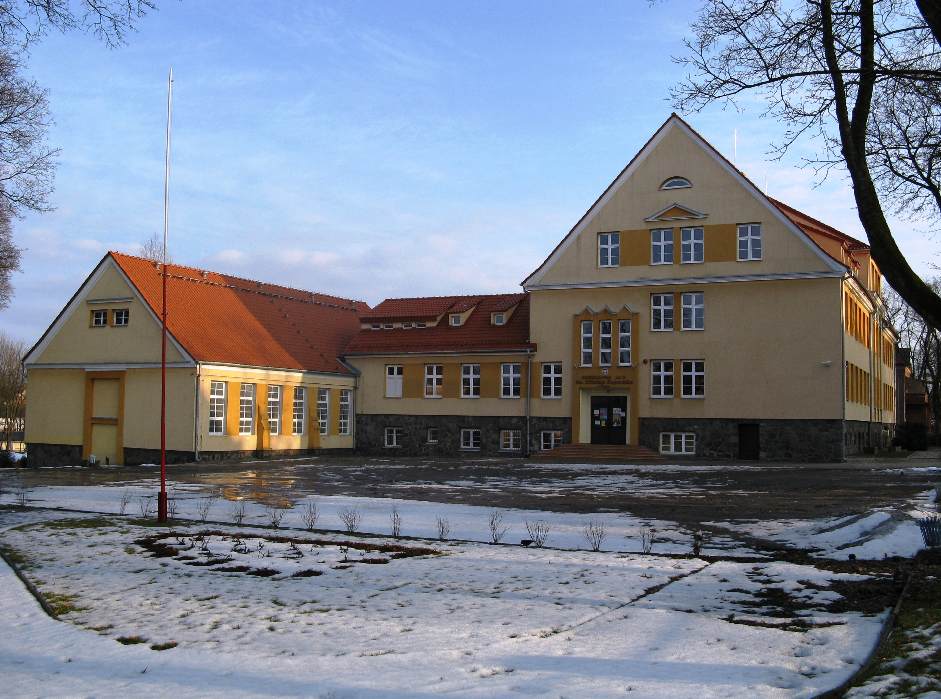 Gimnazjum nr 2 w Olecku.